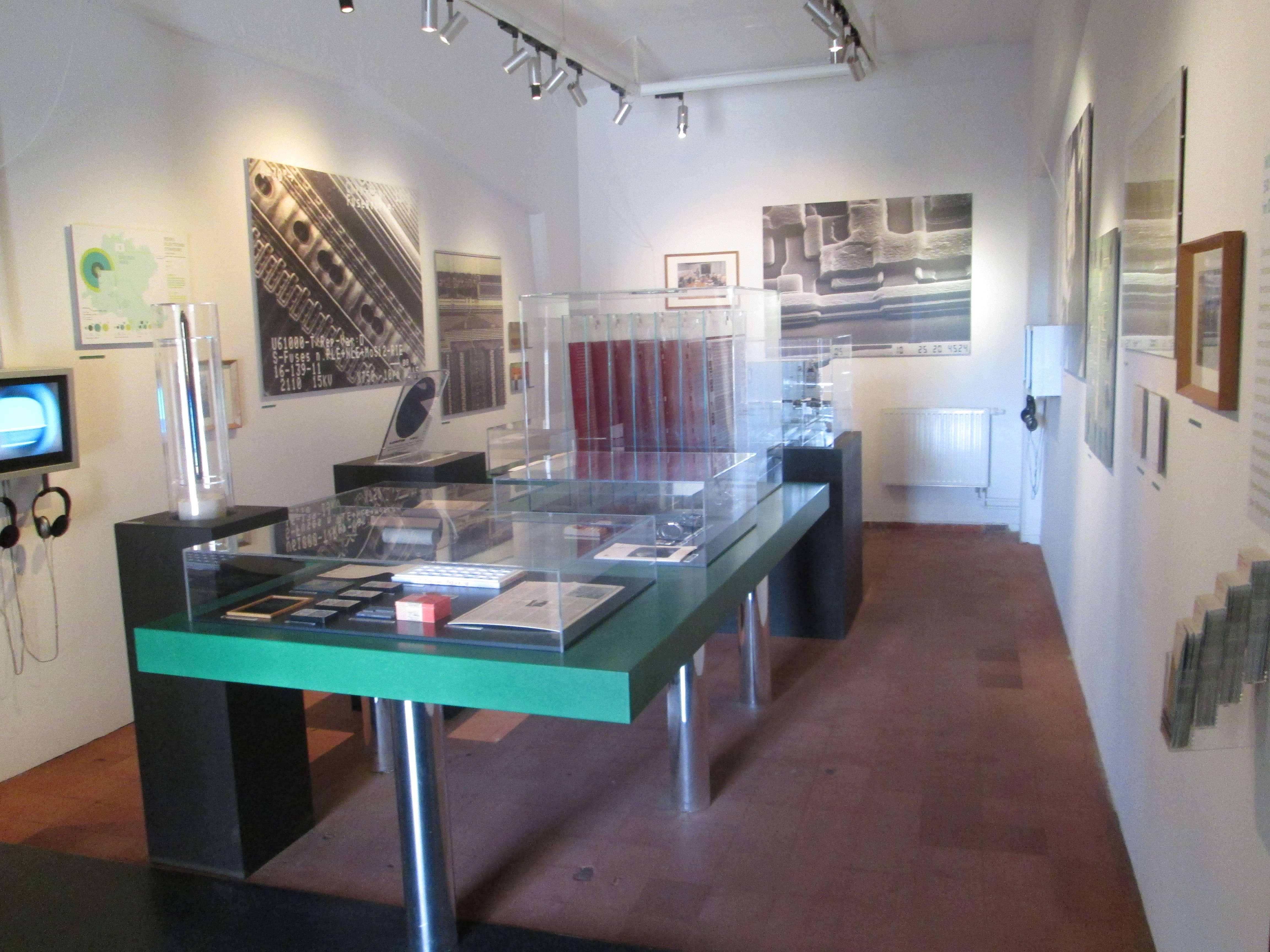 Blick in die Kabinettausstellung "Winzige Riesen, 50 Jahre Mikroelektronik in Dresden" der Technischen Sammlung Dresden. Aufgenommen am 27.08.2013.